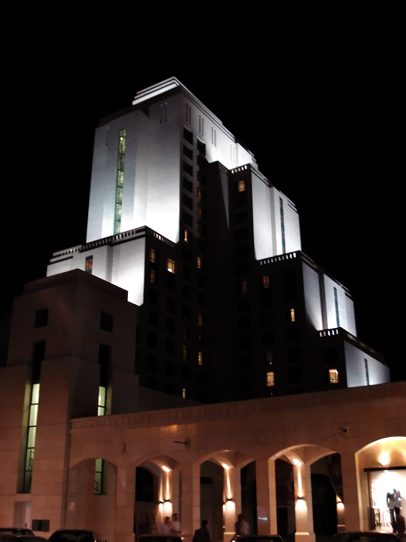 فندق الفور سيزنس وسط دمشق ليلاً